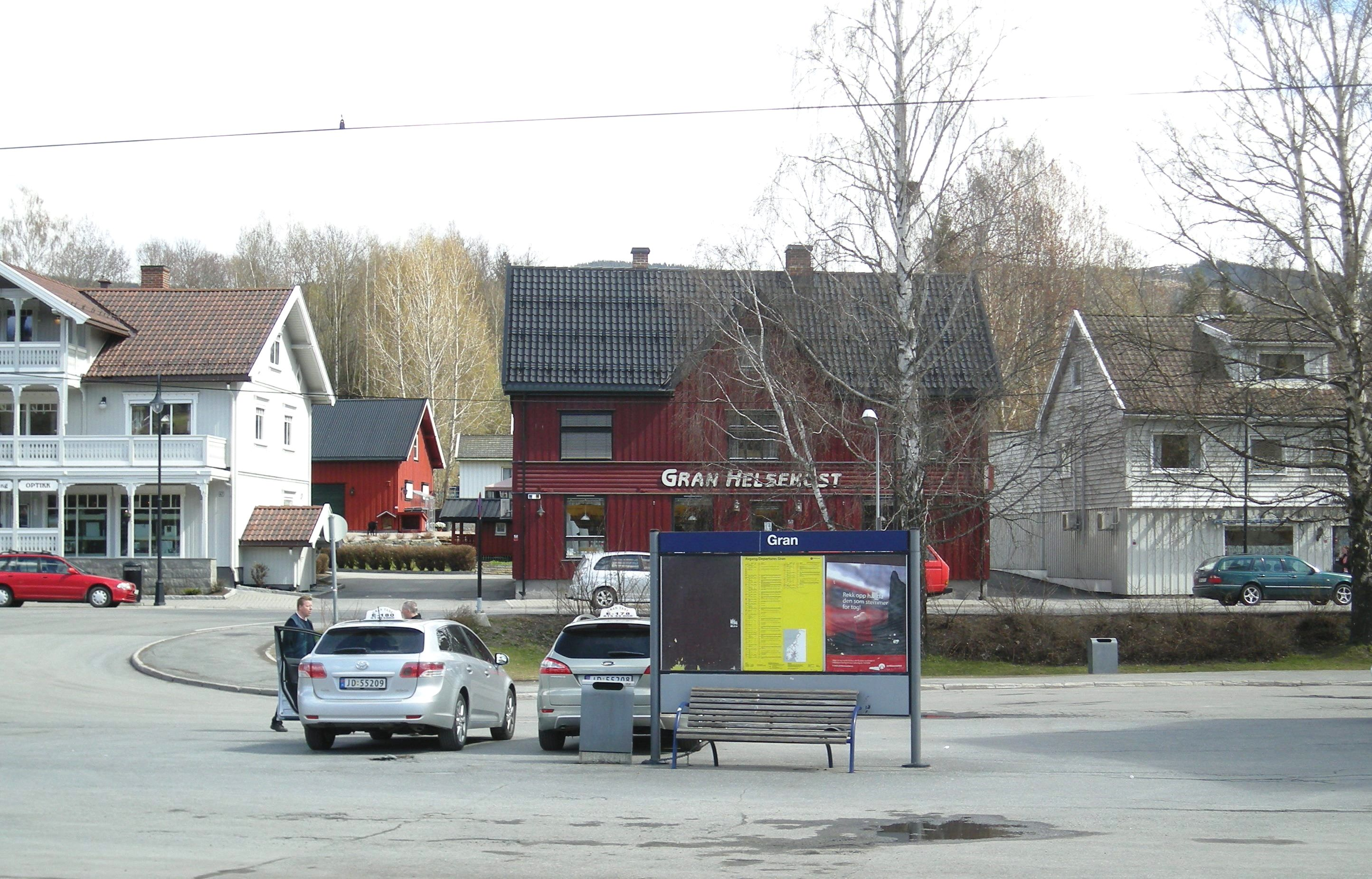 Storgata på Gran (FV2306) går forbi Gran stsjon på østsiden.